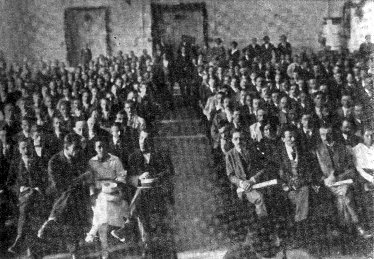 Srpskohrvatski / српскохрватски: Delegati drugog kongresa KPJ juna 1920. godine u radničkom domu u Vukovaru.